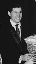 Berlin, Siegerehrung Irene Müller, Hans-Georg Dallmer Zentralbild 15.11.1962 Internationale Eiskunstlauf-Pokalwettkämpfe in Berlin Den Auftakt der Internationalen Eiskunstlauf-Pokalwettkämpfe in der Berliner Werner-Seelenbinder-Halle am 14.11.1962 gewannen im Paarlauf das DDR-Paar Irene Müller-Hans-Georg Dallmer. UBz: Die glücklichen Erstplatzierten nach der Siegerehrung. Tatjana Scharonowa-Alexander Gorelik (UdSSR), I. Müller-H.G. Dallmer (DDR) und Brigitte Wokoeck-Heinz-Ulrich Walther (DDR) (vlnr) (Kohls) Abgebildete Personen: Dallmer, Hans-Georg: Eiskunstpaarläufer, DDR Müller, Irene: Eiskunstläuferin, Paarlauf, DDR Walther, Heinz-Ulrich: Eiskunstläufer, Paarlauf, SC Dynamo Berlin, Olympiateilnehmer 1968, DDR